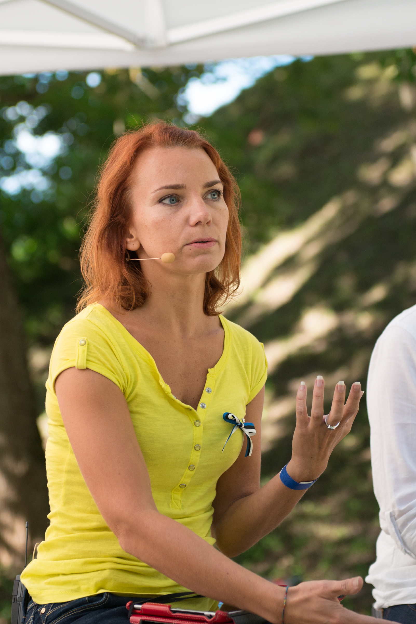 Keit Pentus-Rosimannus